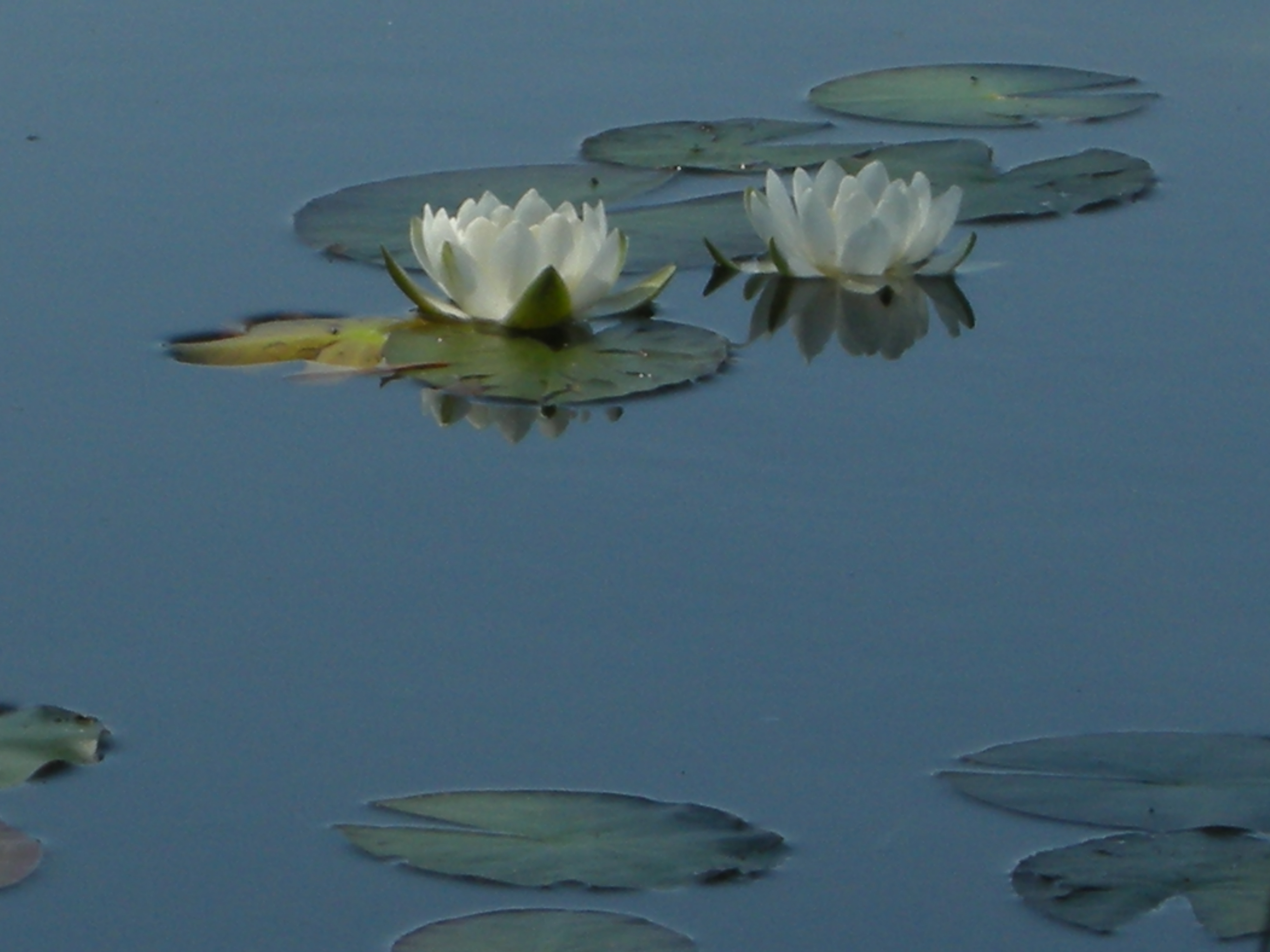 Квіти білого латаття на Святому озері.